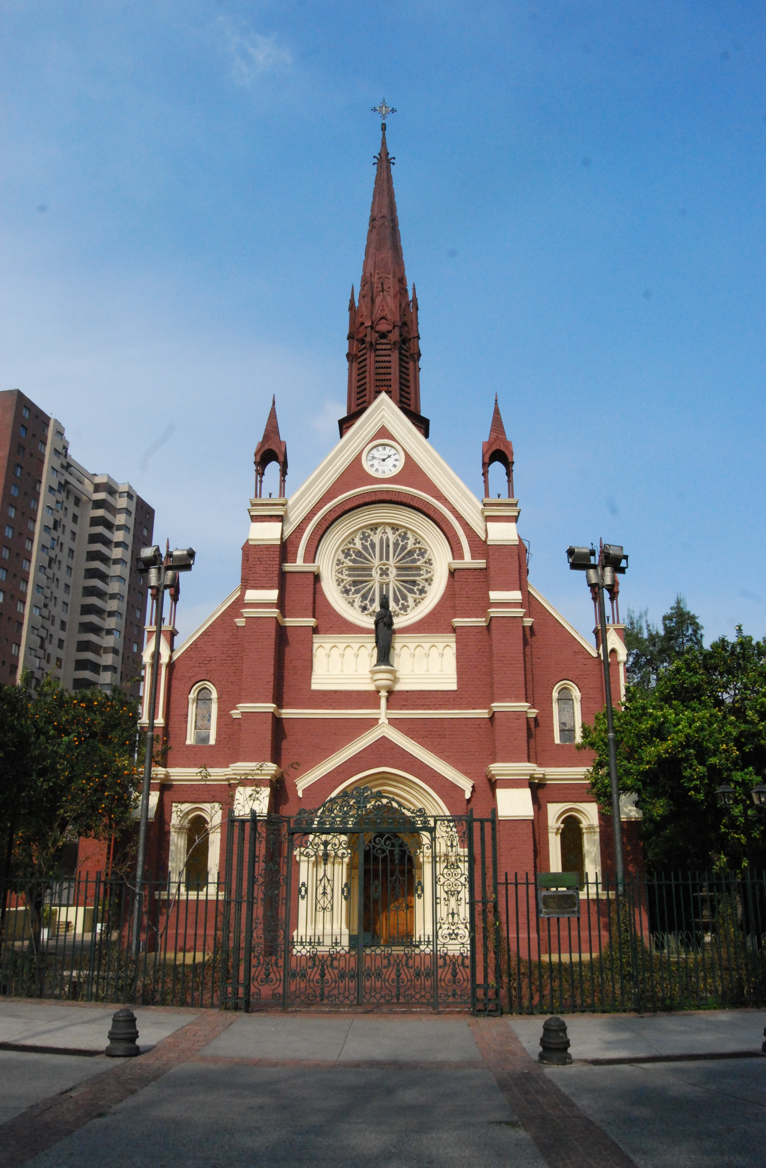 La iglesia de San Francisco de Borja, ex capilla o iglesia Sagrado Corazón de Jesús del Hospital San Borja, es un templo católico neogótico construido de 1876 y que actualmente está destinado al servicio religioso de Carabineros. Está ubicada en la calle Carabineros 160, detrás del monumento a los carabineros ‘'Gloria y victoria y de la Alameda a la altura del número 239.